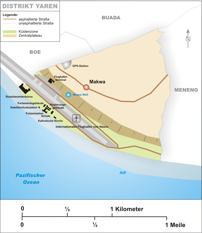 Karte des Distrikt Yaren